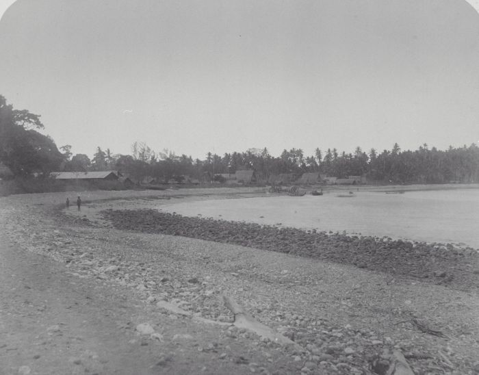 Foto. Kustgezicht bij Tepa